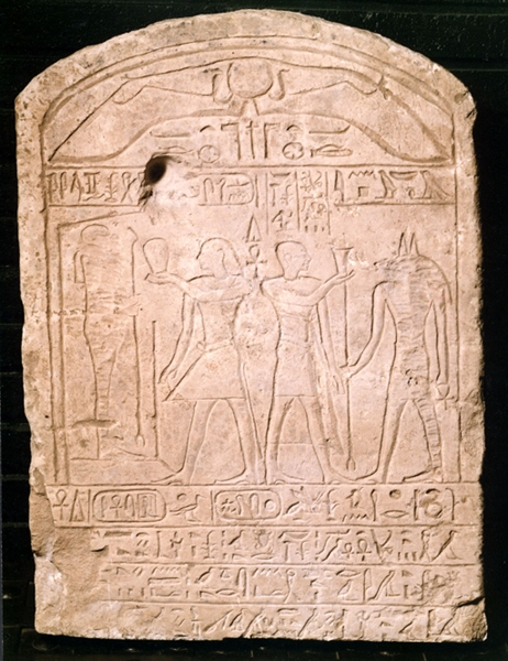 Estela de Nebsumenu (Segundo Periodo Intermedio). Número de inventario: 1999-99-4.